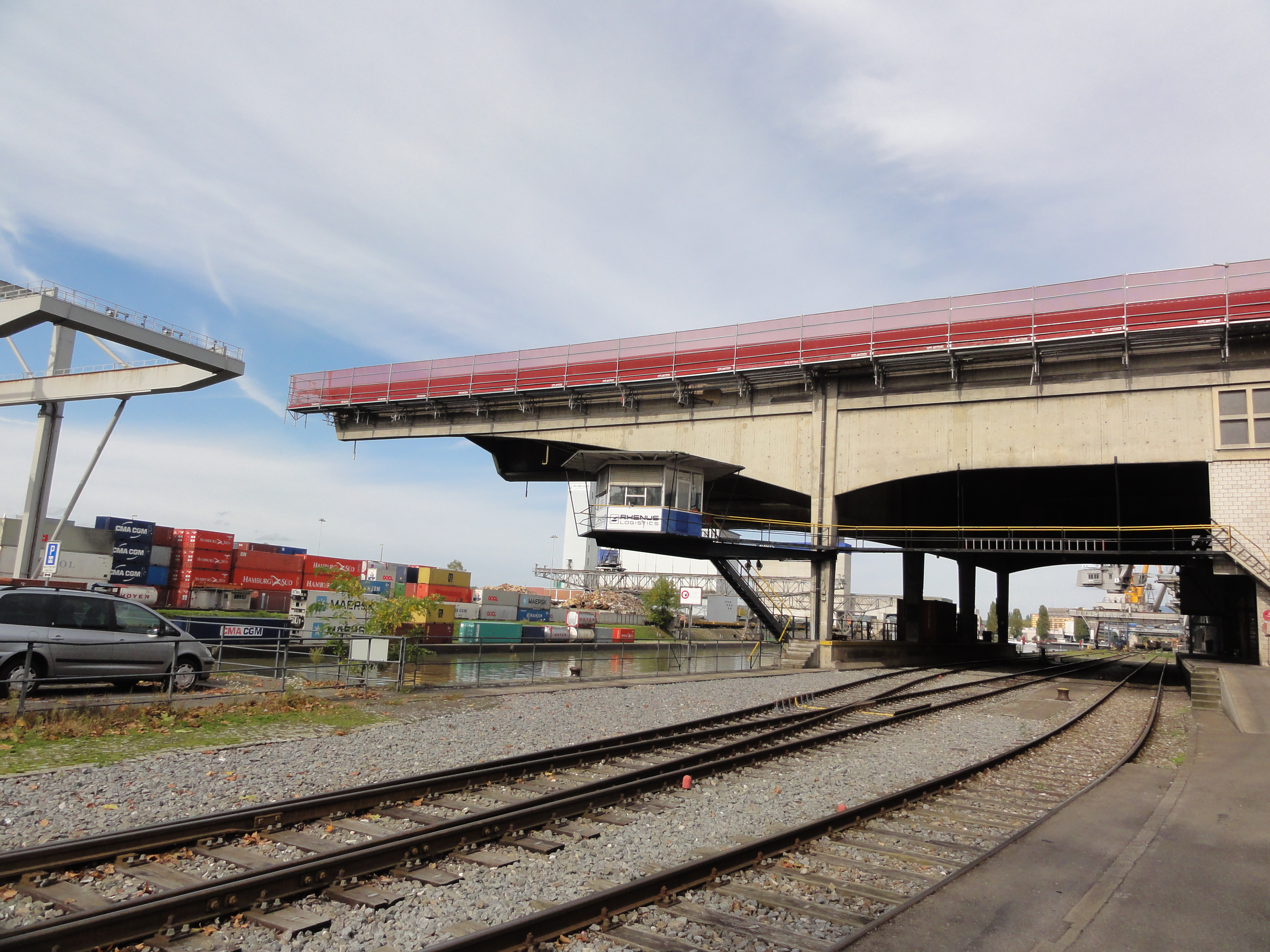 Basel — Hafen